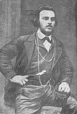 Jurkovskij Fedor Nikolaevich (1851-1896)